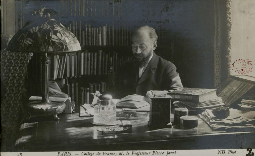 Carte postale